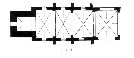 evang.-luth. Kirche St. Martinus zu Spenge. Grundriss der gotischen Bauteile der Kirche.